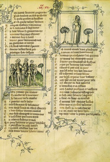 Рукопис Нікола Буало